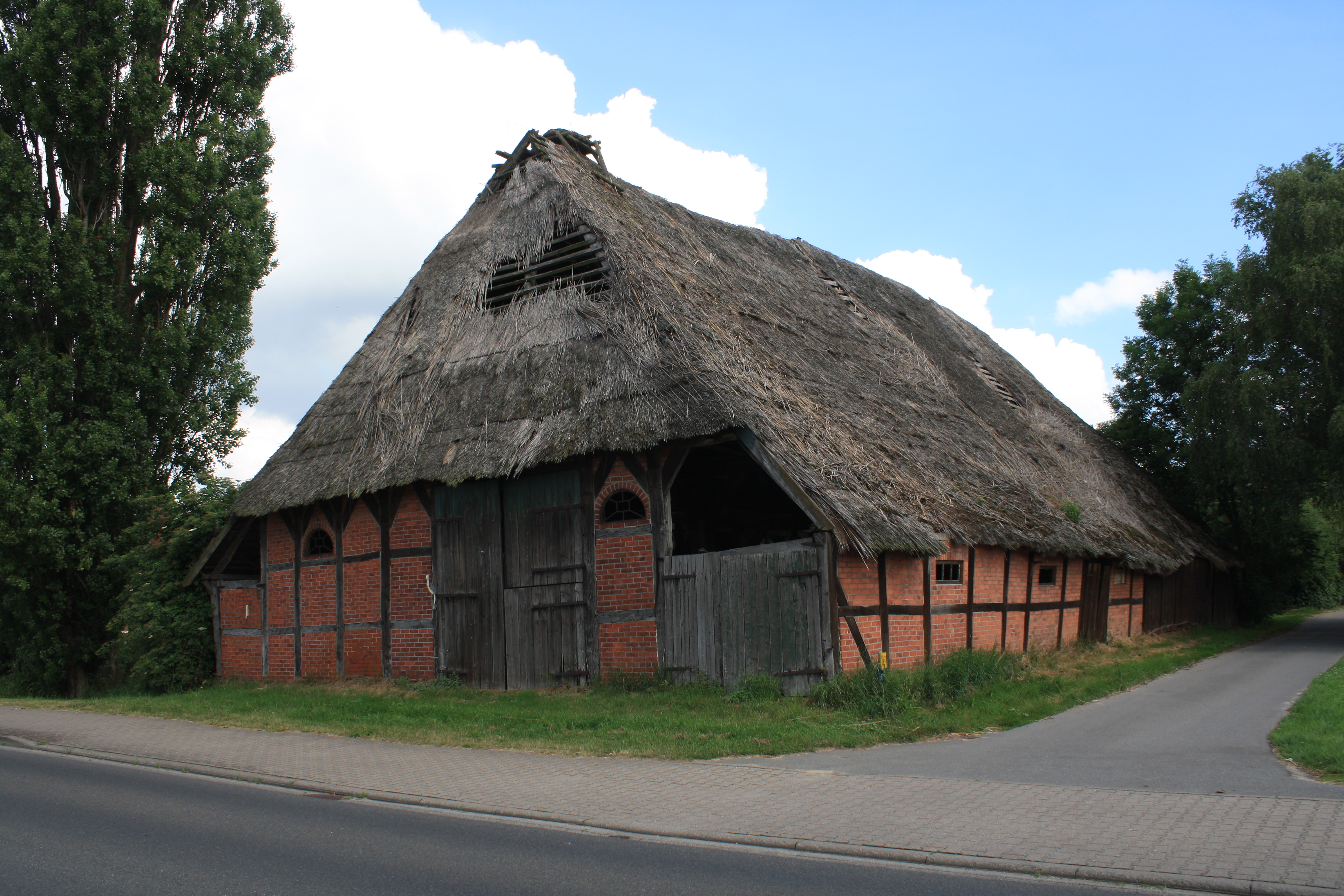 Scheune Elbuferstraße